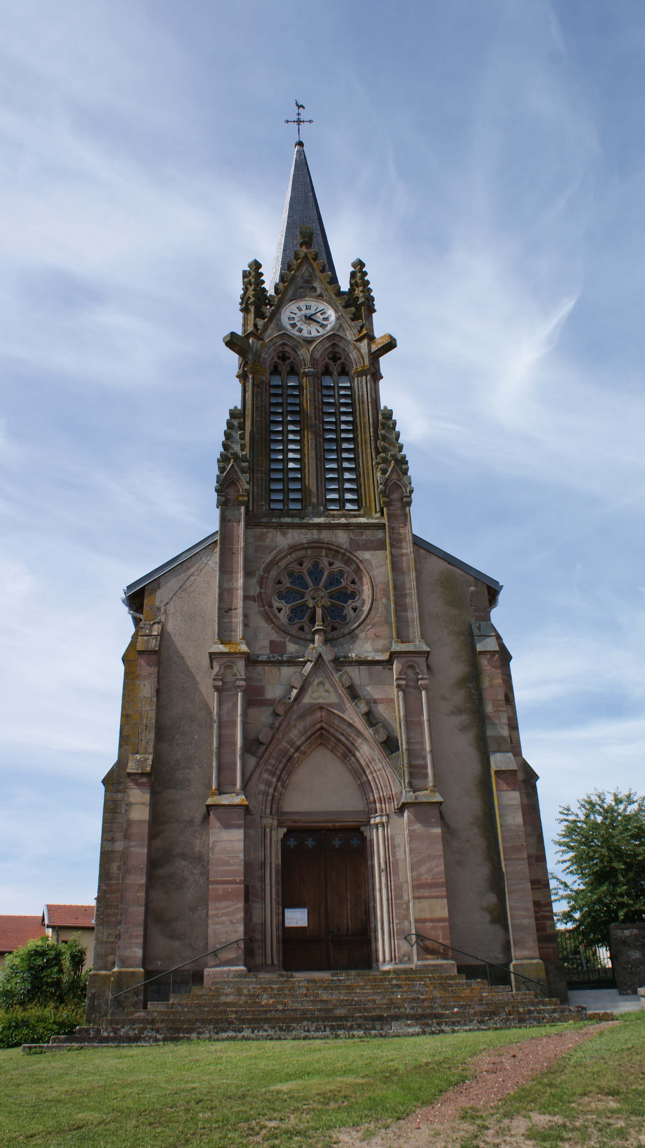 eglise de Saint Maurice aux Forges